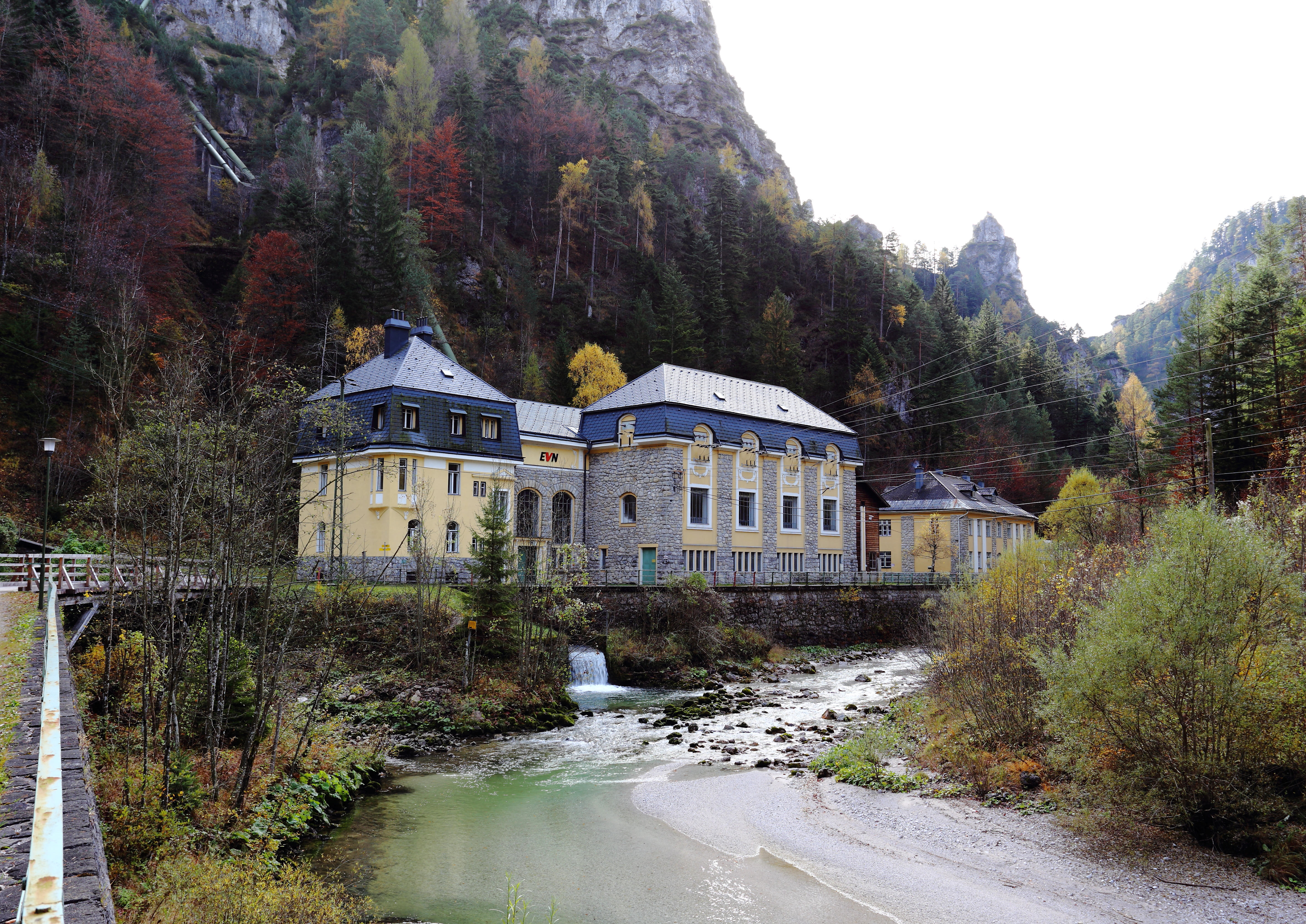 Das niederösterreichische Kraftwerk Wienerbruck am Ende der Ötschergräben bzw. der Tormäuer (Gemeindegrenze Annaberg/Mitterbach am Erlaufsee). Das Kraftwerk wurde von 1908 bis 1911 im Zuge der Elektrifizierung der Mariazellerbahn errichtet und war zu dieser Zeit das größte Speicherkraftwerk Österreich-Ungarns.